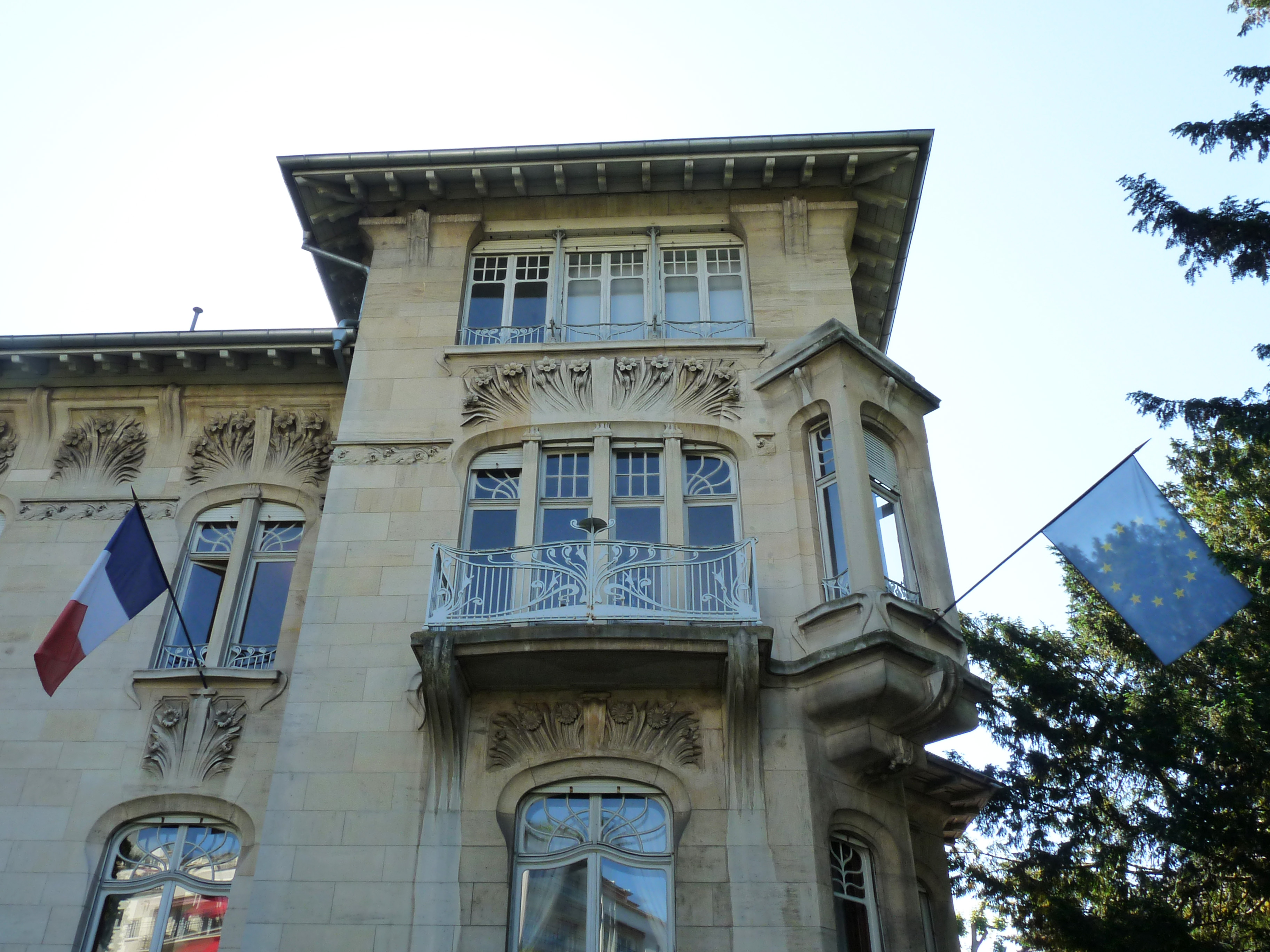 Villa Schutzenberger, 76 allée de la Robertsau, Strasbourg.